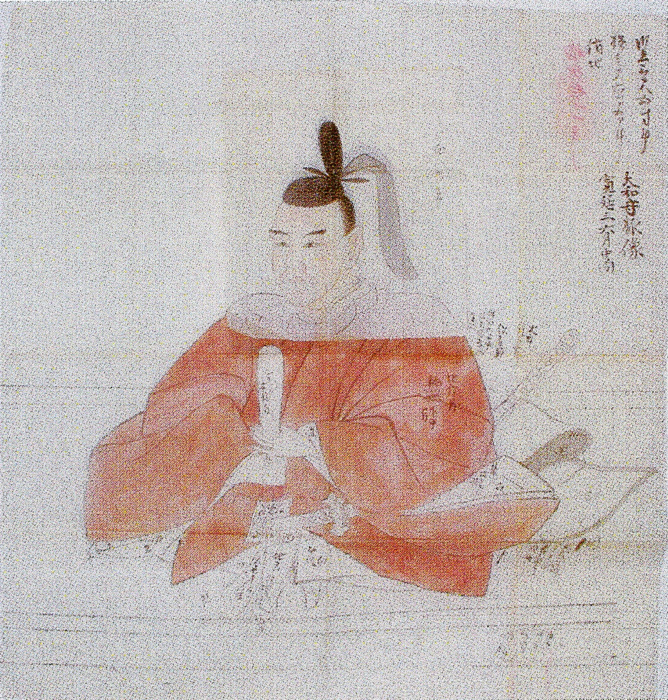 加賀八家横山氏6代当主・横山貴林の肖像画粉本。